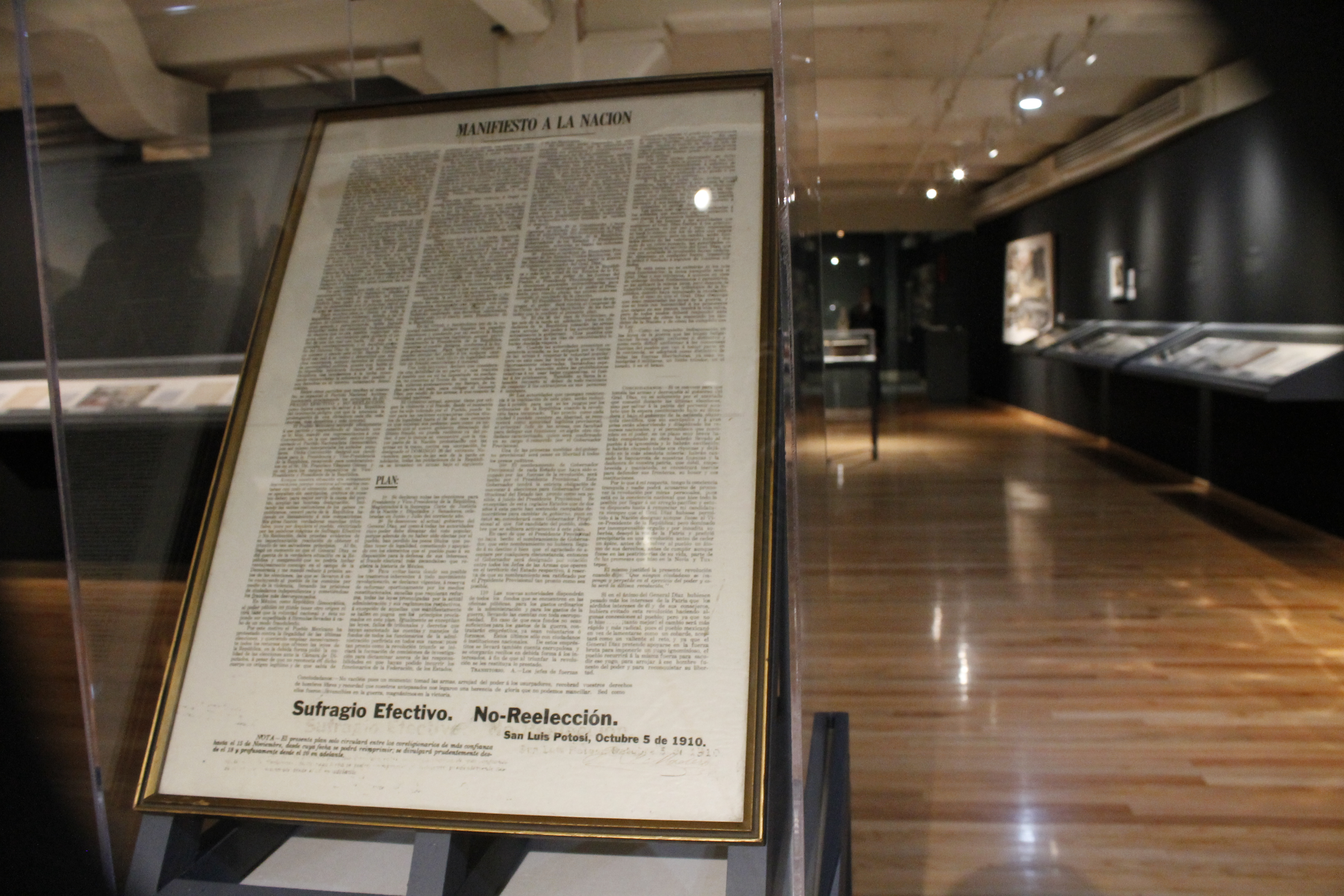 Manifiesto a la Nación (Francisco I. Madero) expuesto en Museo Soumaya